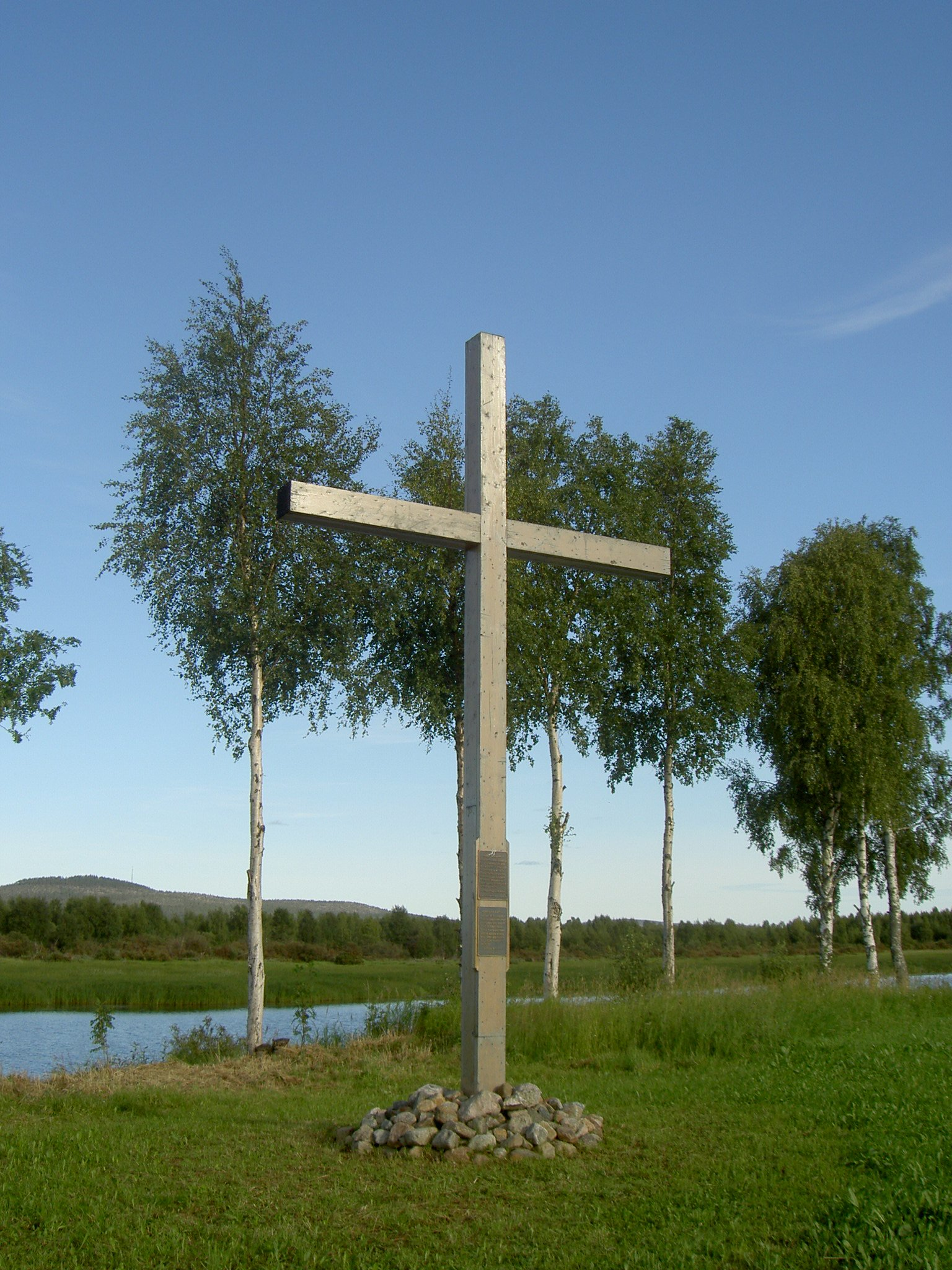 Minneskors över Särkilax kapell som bortspolades vid Torne älvs islossning år 1615. (I bakgrunden berget Aavasaksa i Finland.)